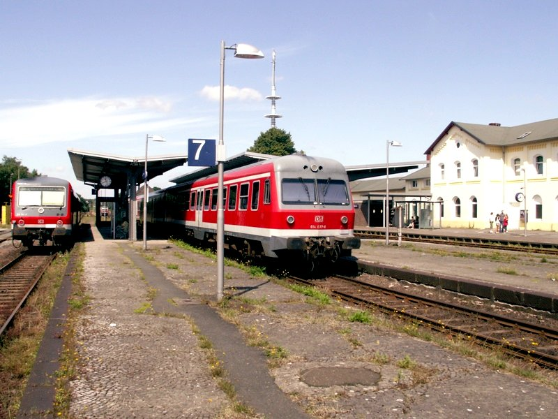 Bf Soltau